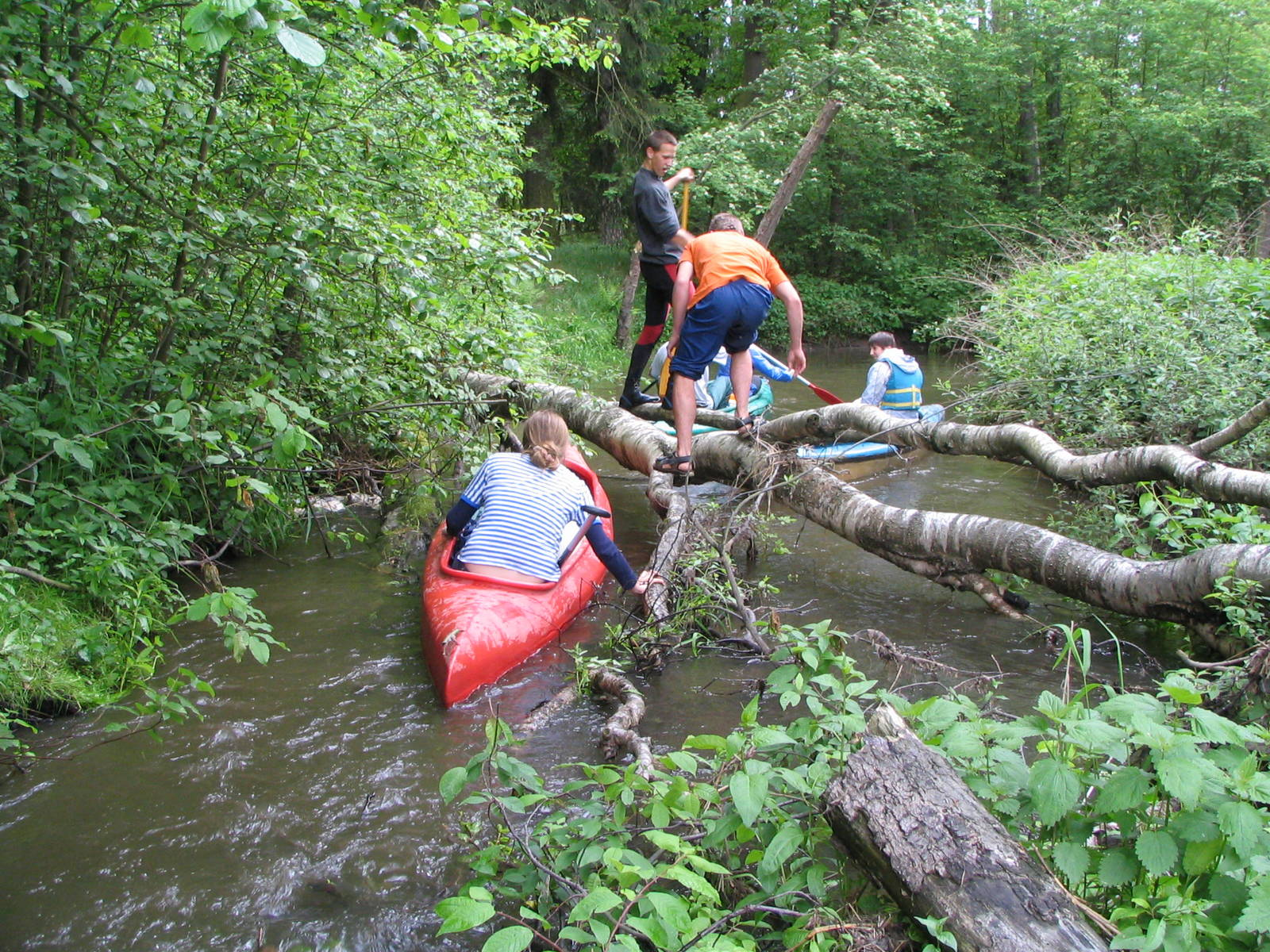 Řeka Ploučnice mezi Mimoní a Borečkem, okres Česká Lípa, Czech Republic